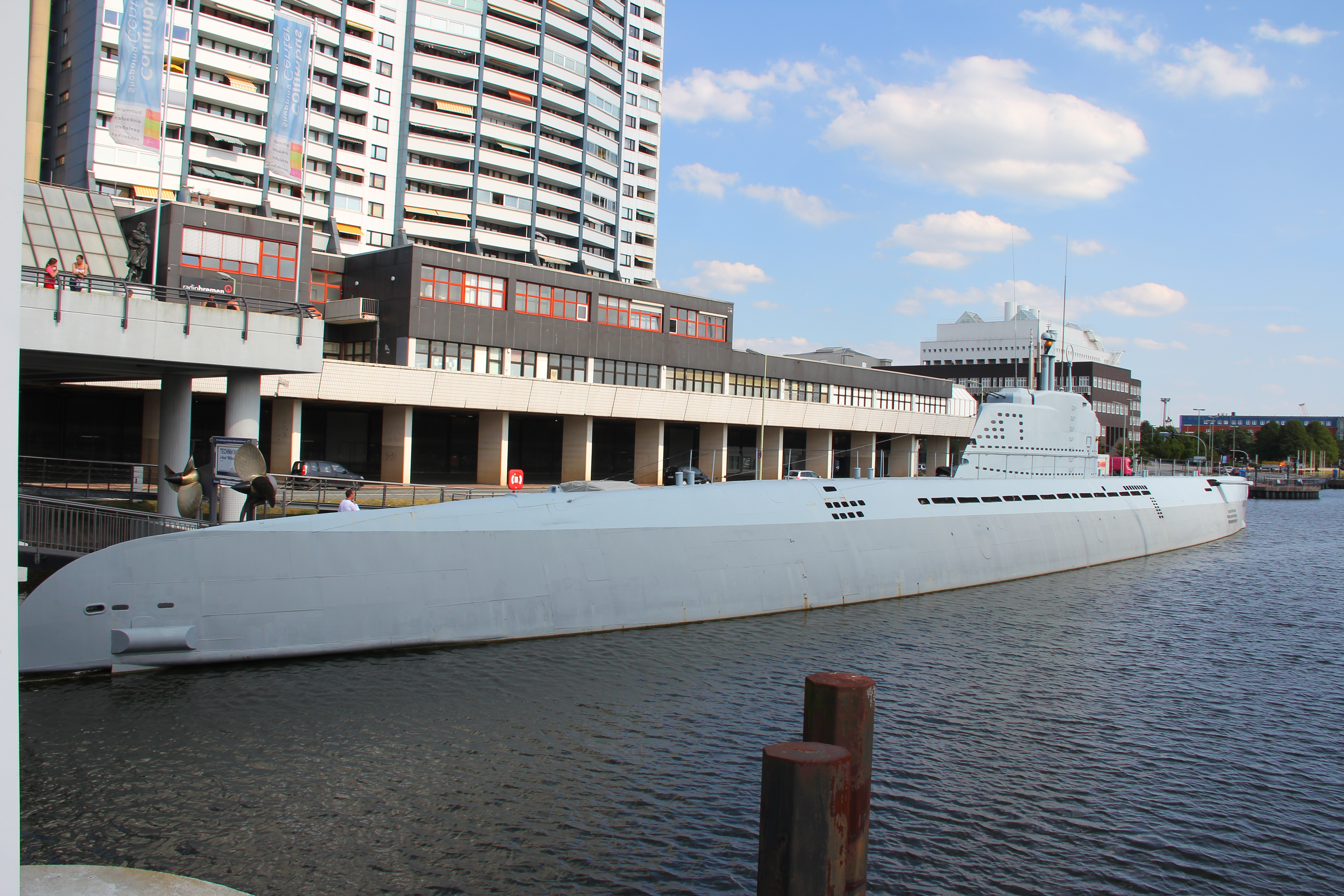 U-Boot Typ XXI U-2540 ("Wilhelm Bauer")